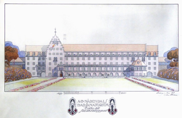 Tupavuoren merikylpylä oli Naantalissa Naantalinsalmen rannalla sijainnut merikylpylä, joka toimi vuodesta 1918 1940-luvulle. Arkkitehti Uno Ullberg oli myös osakkaana hankkeessa ja hän laati sanatoriosta rakennussuunnitelman, joka hyväksyttiin marraskuussa 1917. Rakennusta ei kuitenkaan koskaan rakennettu